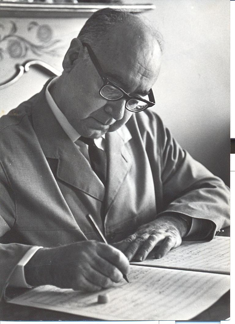 fotografia de Joaquim Homs